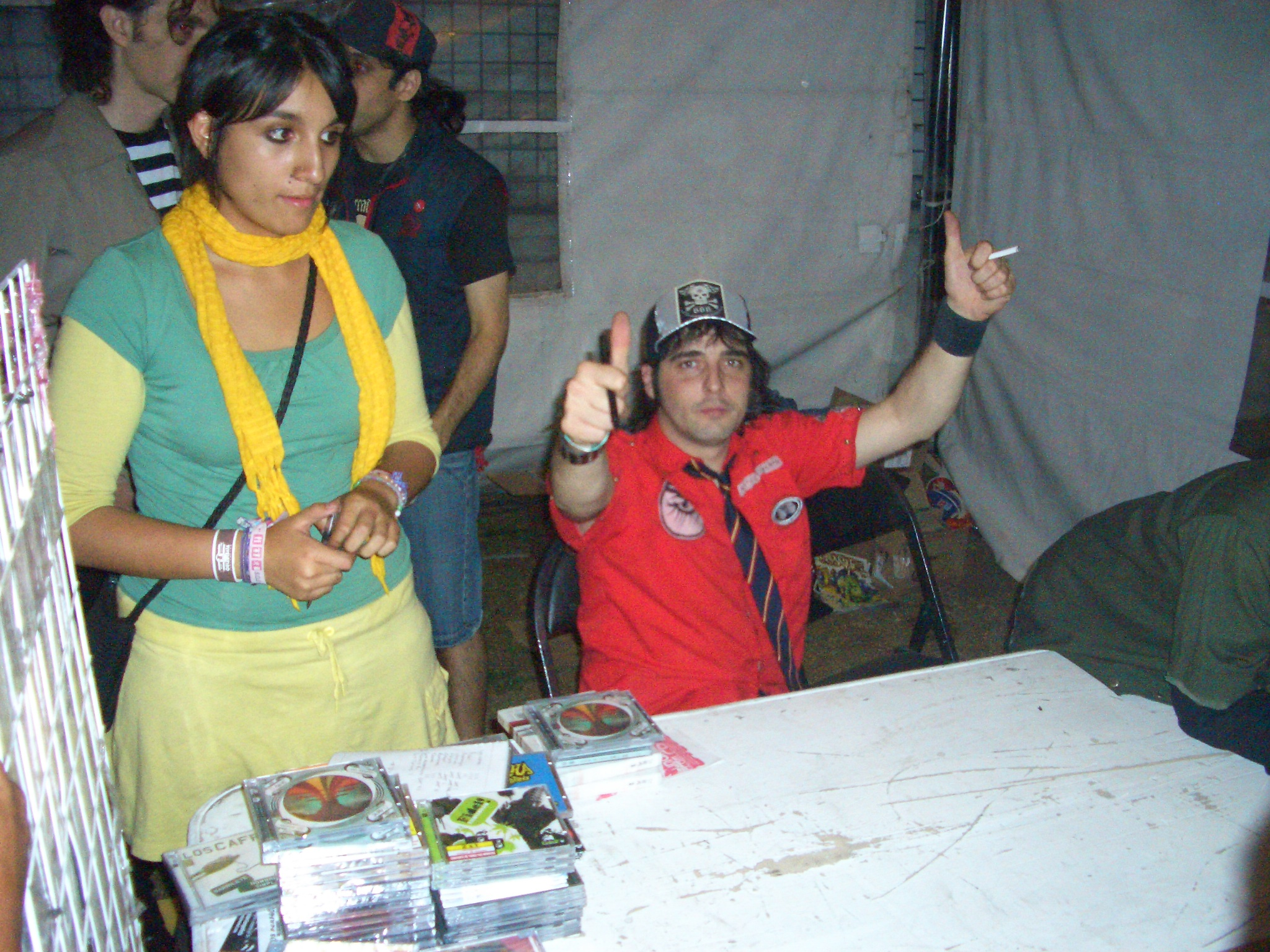 Ray Fajardo